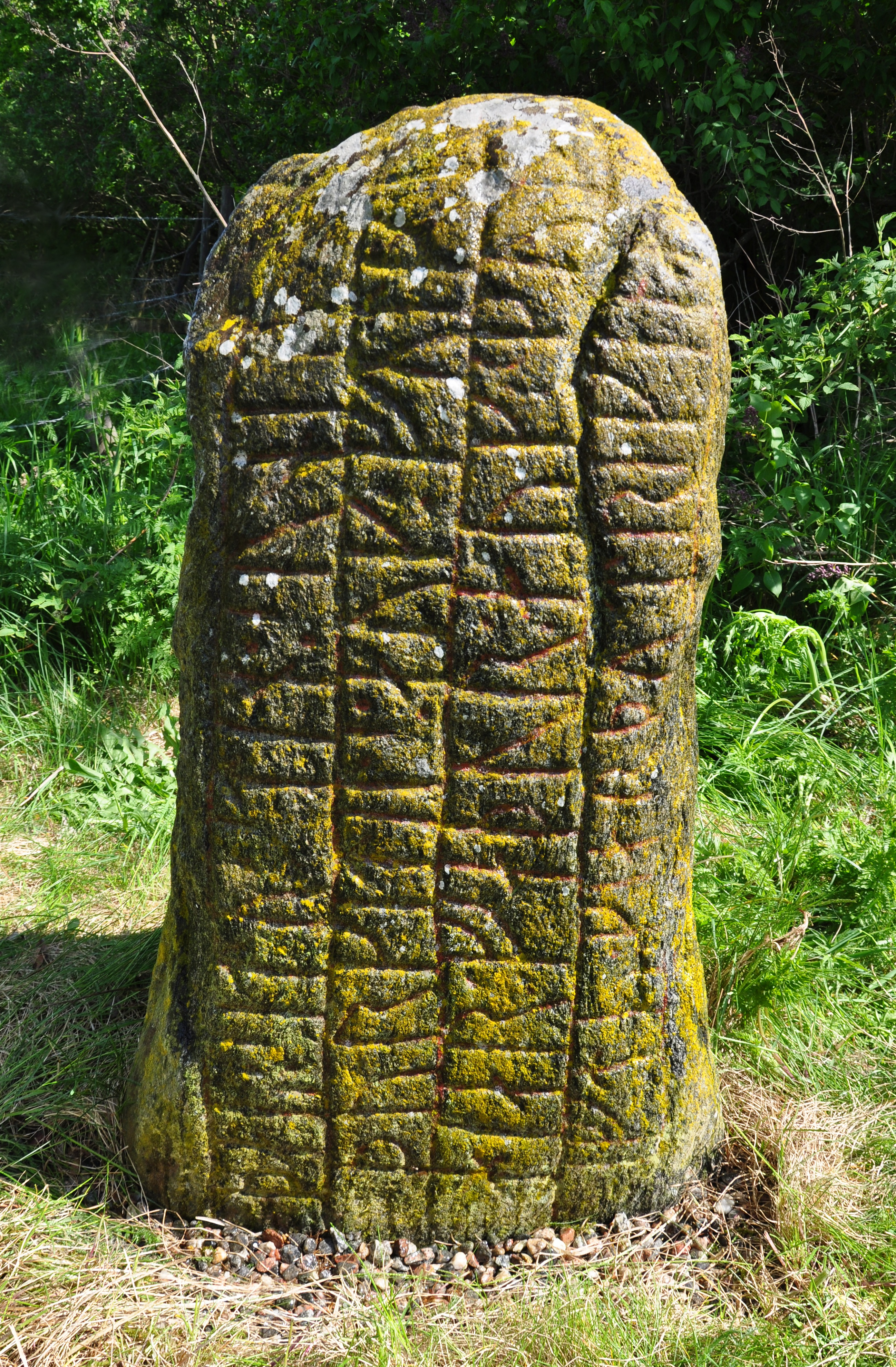 Runsten / runestone Sö 113, Kolunda, Södermanland.